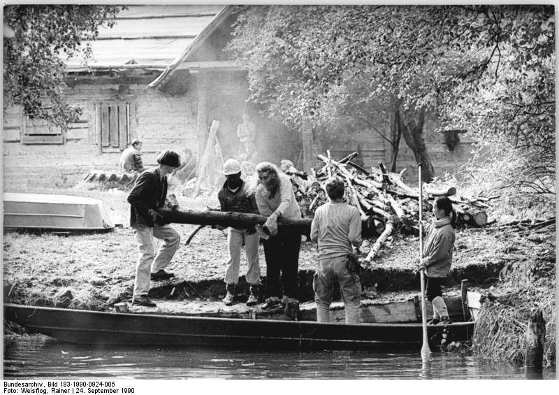 Spreewald, Teilnehmer eines ökologischen Work-Camps ADN-Rainer Weisflog 24.9.90 Bez. Cottbus: Naturschutz- Gegenwärtig wird im anerkannten Biosphärenreservat Spreewald eine Naturschutzstation im ehemaligen Forsthaus "Eiche" eingerichtet, einem seit zehn Jahren leerstehenden Gebäude. Dabei halfen während eines zweiwöchigen sogenannten Work-Camps junge Naturschützer aus der BRD, Frankreich, Ghana, Hong Kong, den Niederlanden und den USA. Sie übernehmen auch konkrete Plegearbeiten im Spreewald.